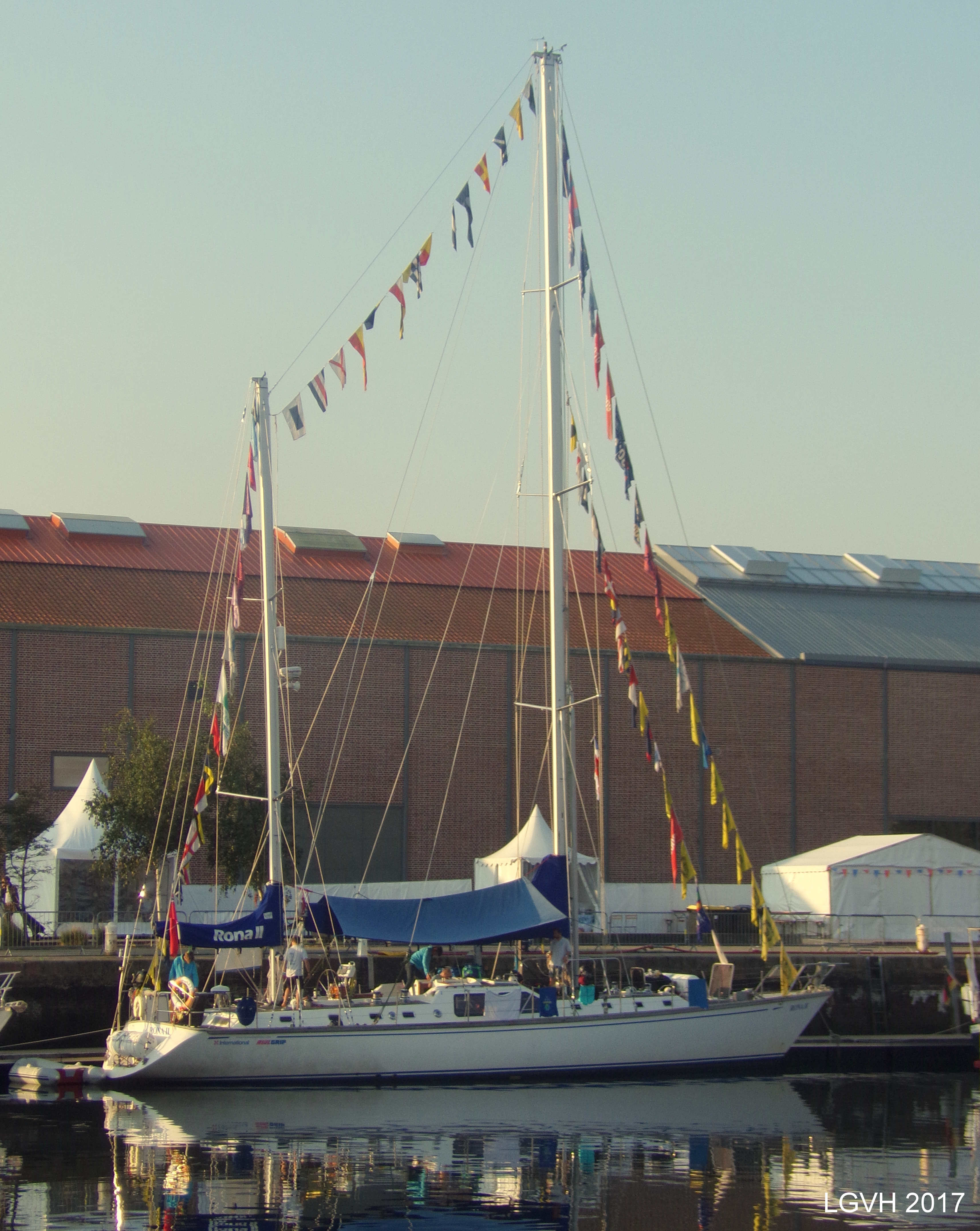 Le ketch bermudien RONA II (Royaume-Uni) - Les Grandes Voiles du Havre